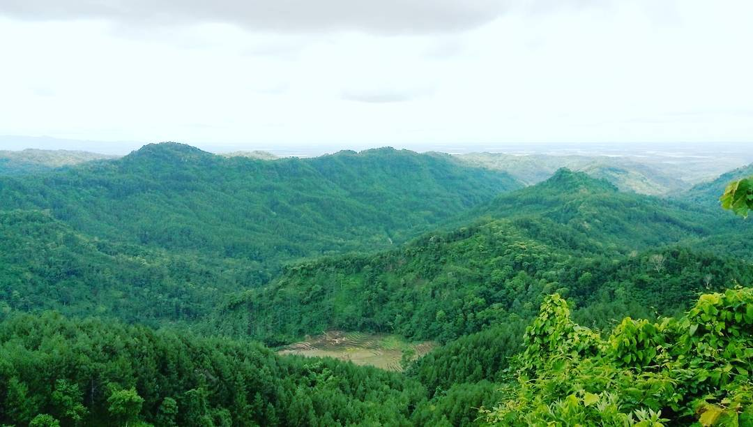 Tranggulasli